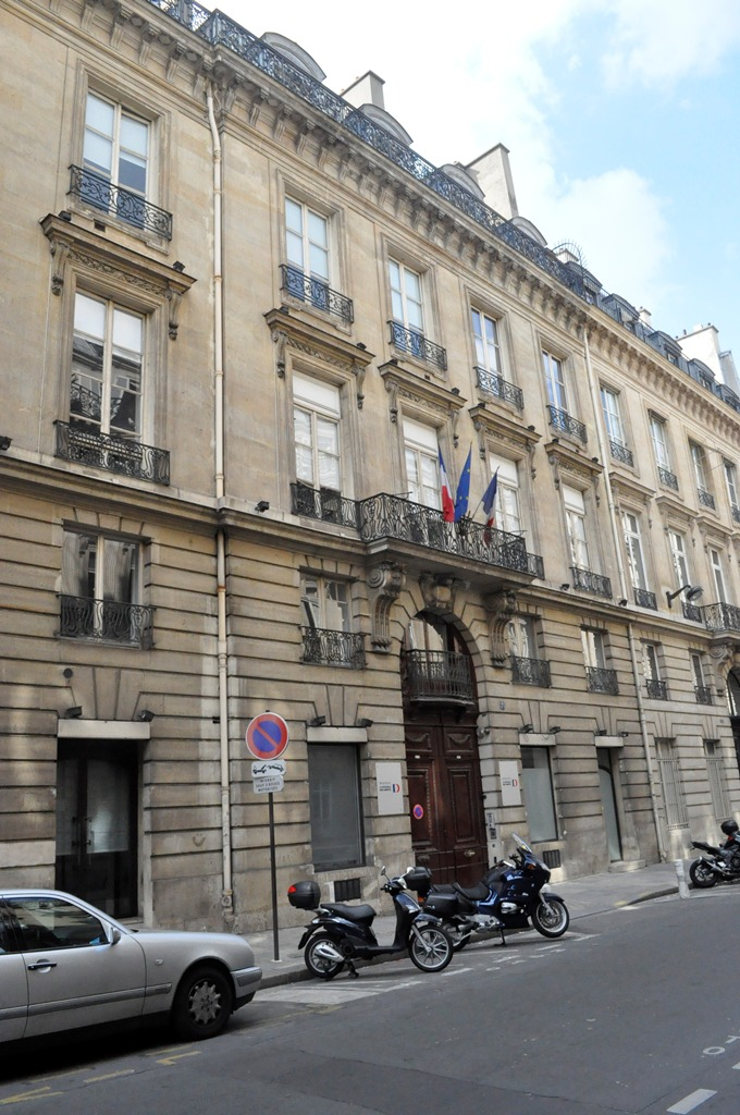 Le Maître, 7 rue Saint-Florentin, 8e arrondissement de Paris. Ancien siège du Siège du Médiateur de la République puis du Défenseur des droits.